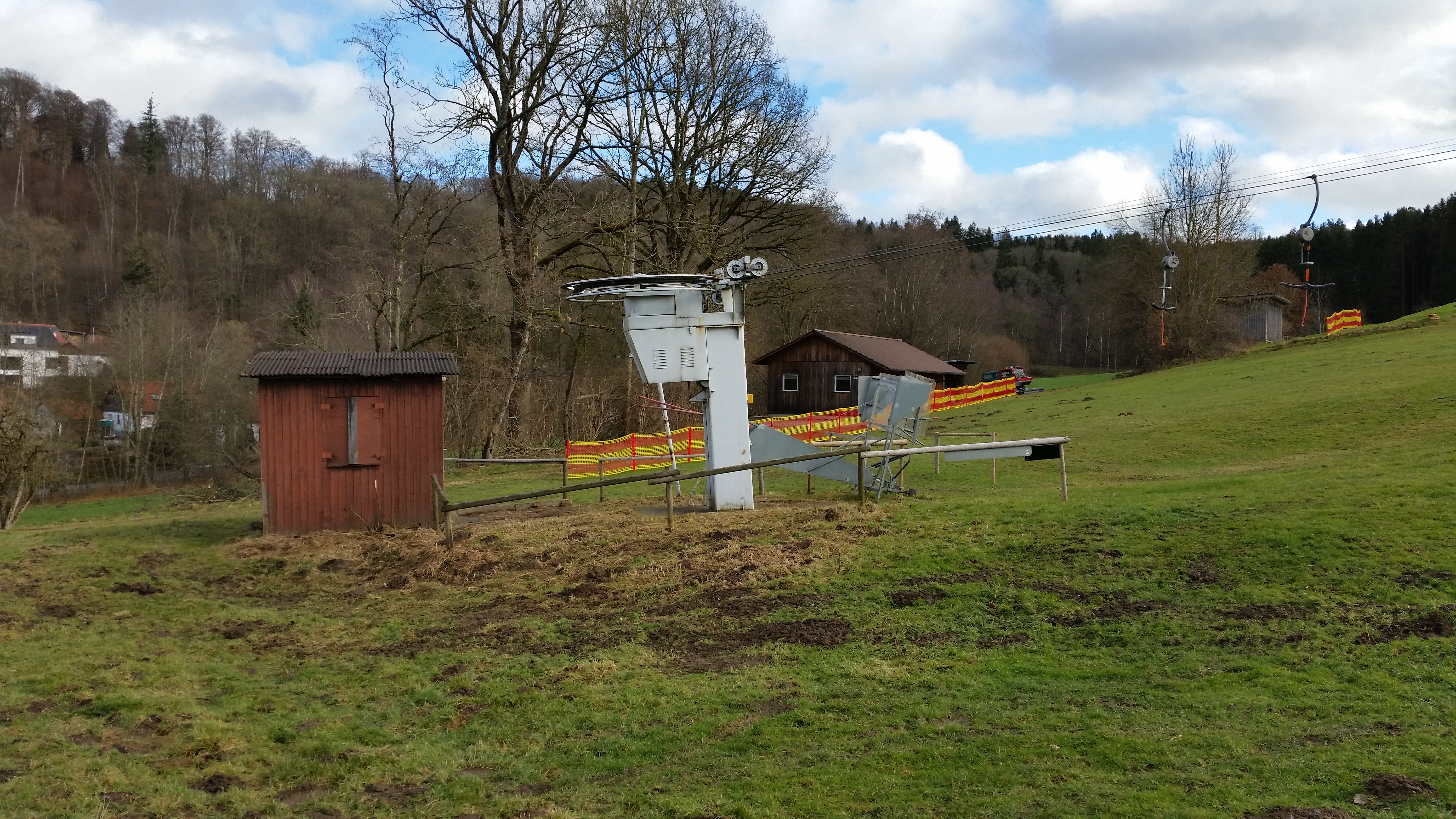 Anlage